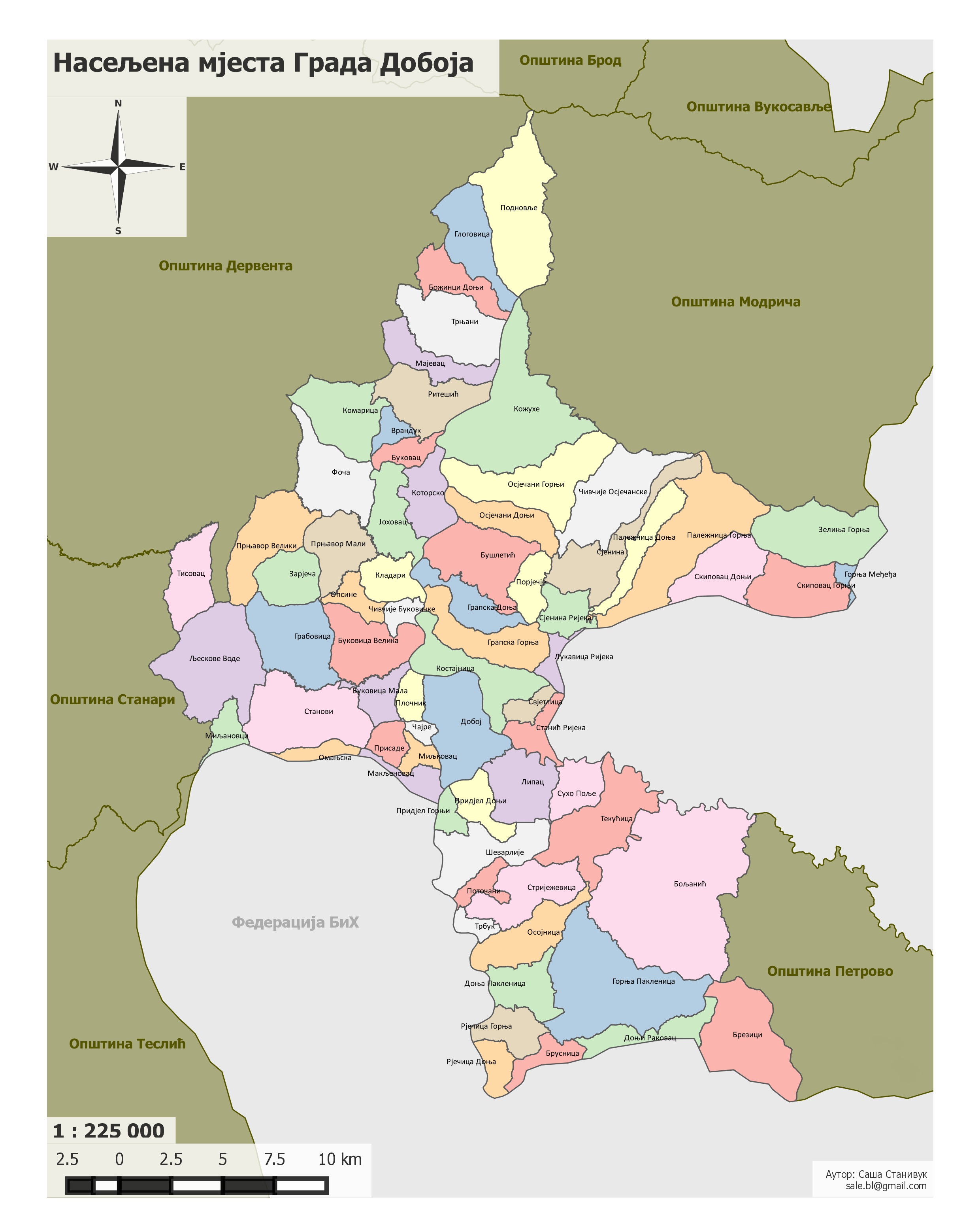 Српски (ћирилица): Насељена мјеста Града Добоја од 2014. године